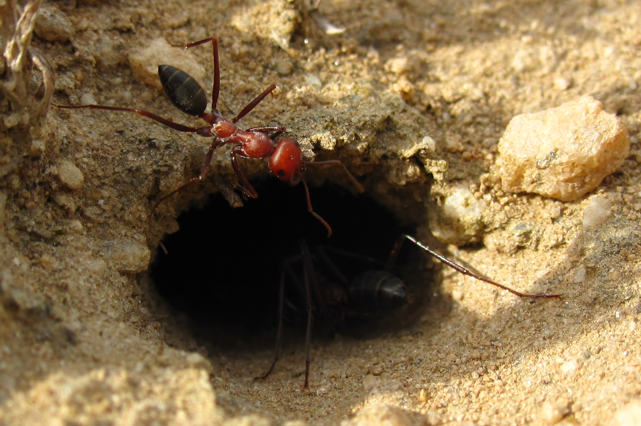 Мравки - с. Мажучиште, Прилеп.